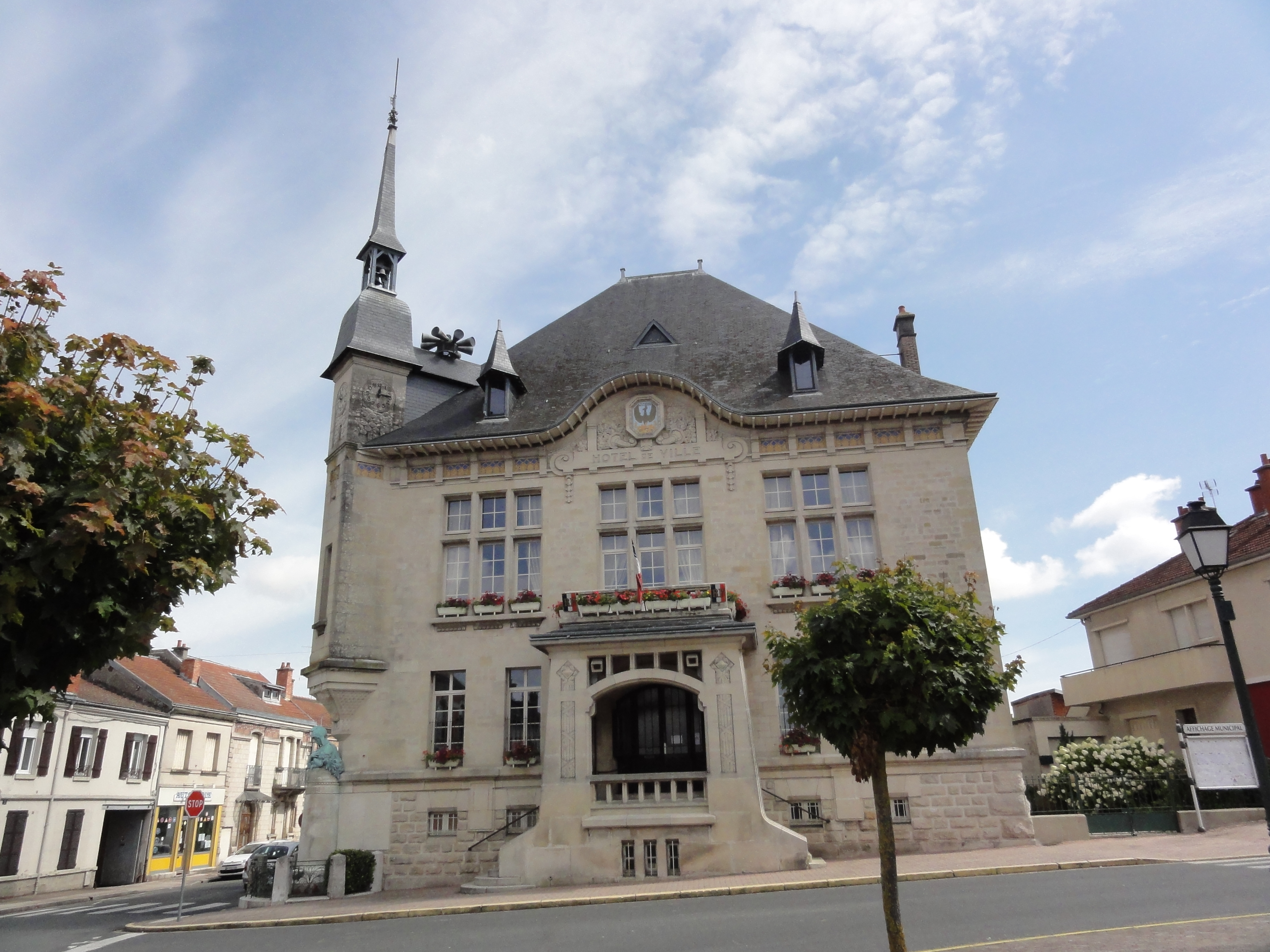 Sermaize-les-Bains (Marne) hôtel de ville